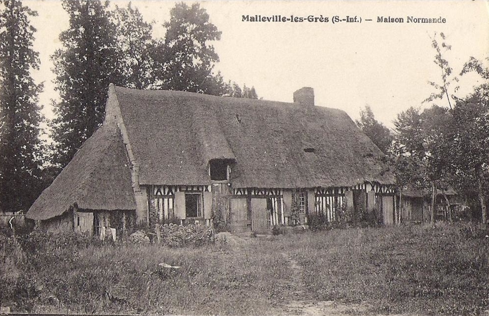 Vieille ferme à colombage au toit de chaume vers 1920.